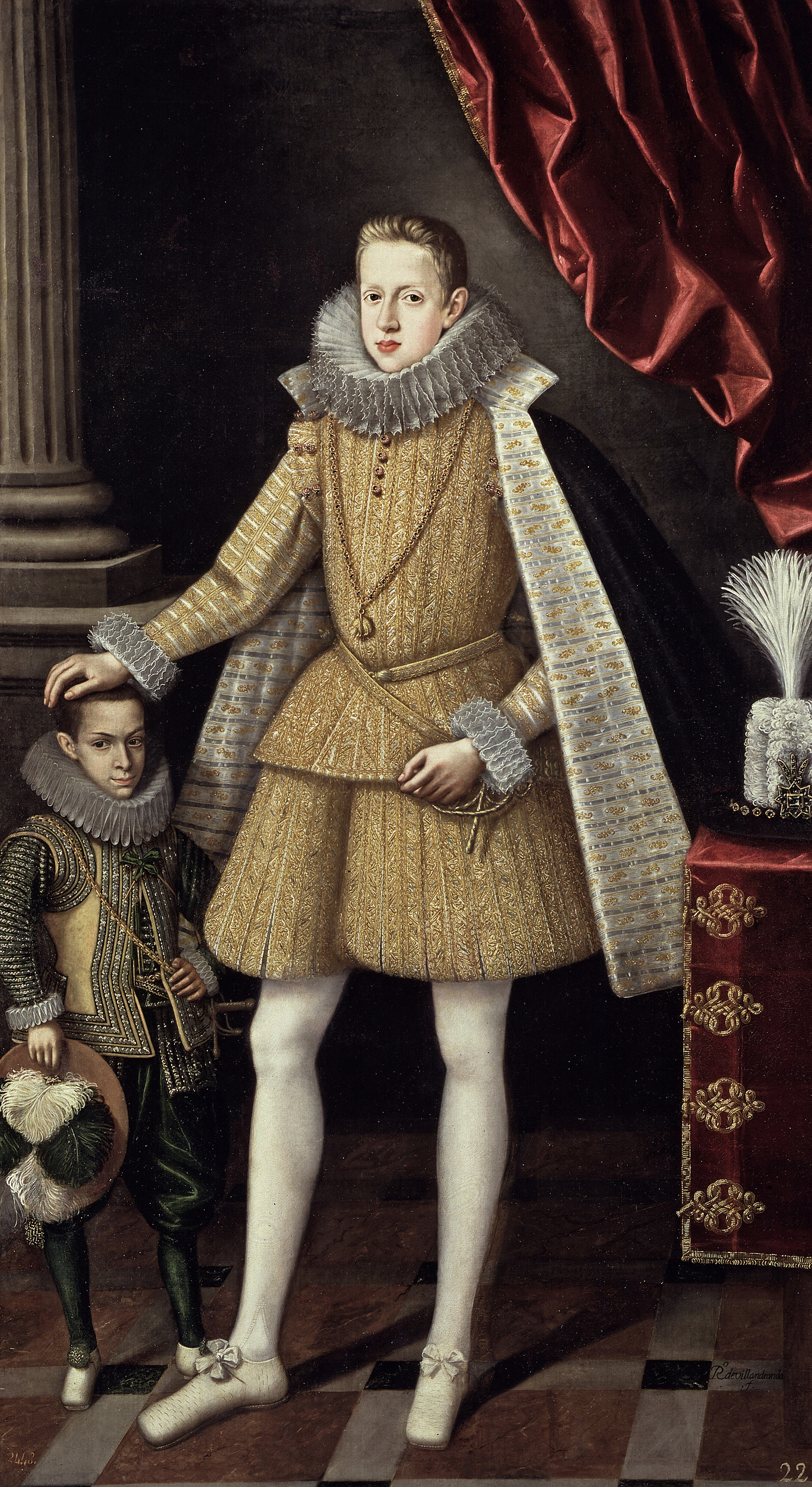 El príncipe Felipe y el enano Miguel SoplilloPortrait of infante Felipe (future Phillip IV) with dwarf Soplillotitle QS:P1476,es:"El príncipe Felipe y el enano Miguel Soplillo" label QS:Les,"El príncipe Felipe y el enano Miguel Soplillo" label QS:Len,"Portrait of infante Felipe (future Phillip IV) with dwarf Soplillo" label QS:Lru,"Родриго де Вильяндрандо. Портрет инфанта Филиппа (Филиппа IV) с карликом Соплильо. 1620 г. Мадрид, Прадо"